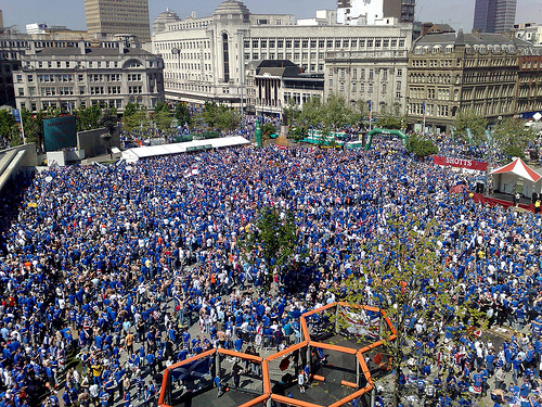 Piccadilly_Rangers_fanzone